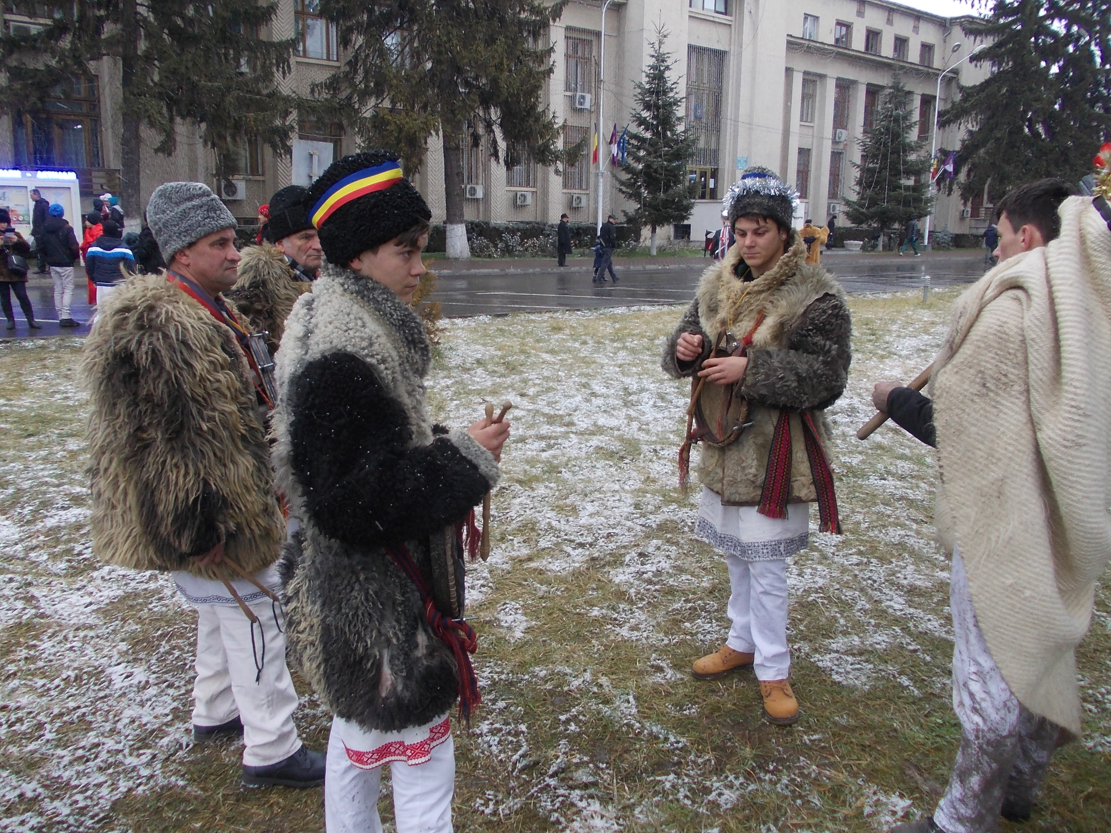 Ceată de urători din zona Romanului